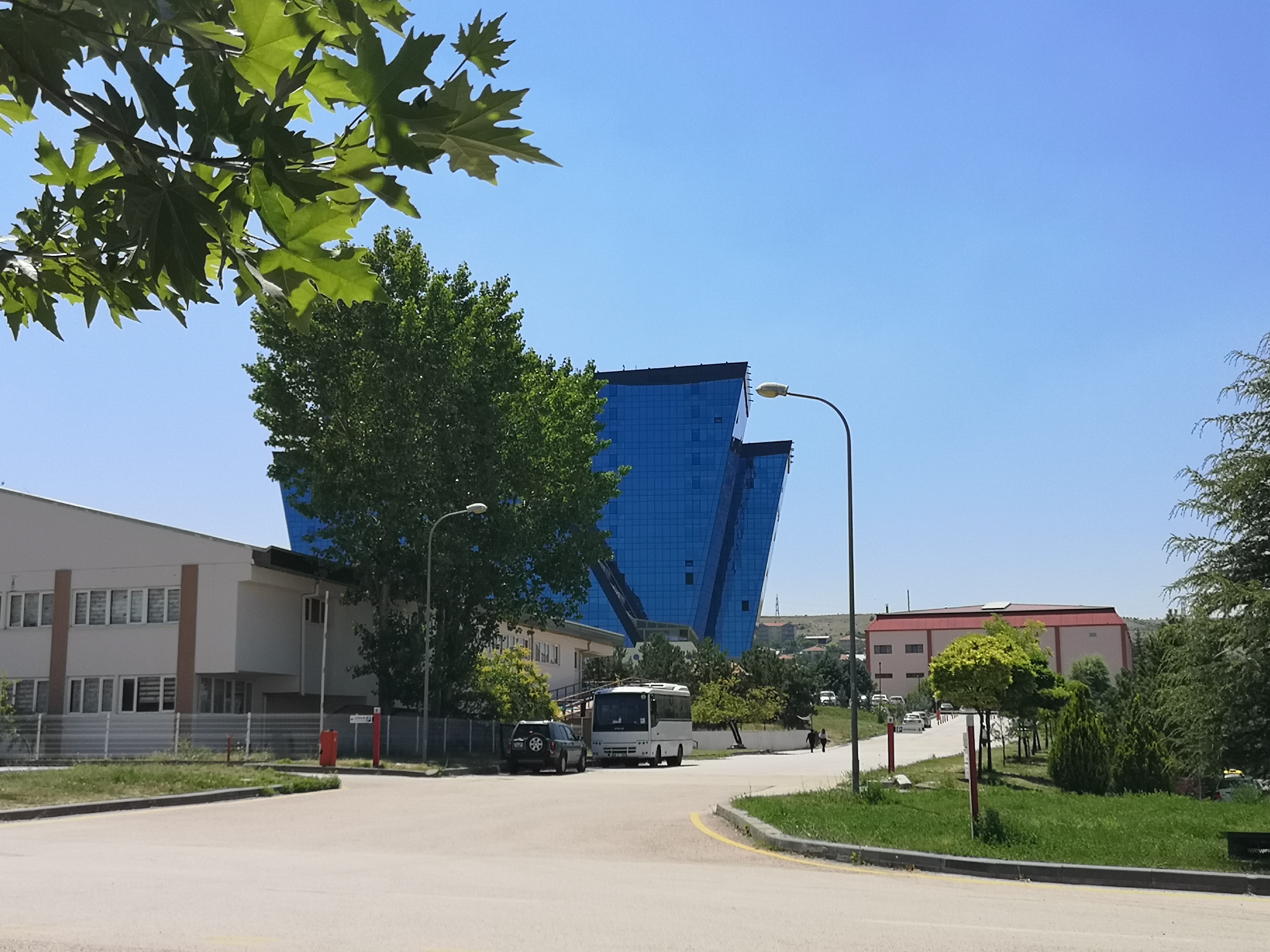 Hacettepe Üniversitesi, Beytepe Kampüsü, 2020